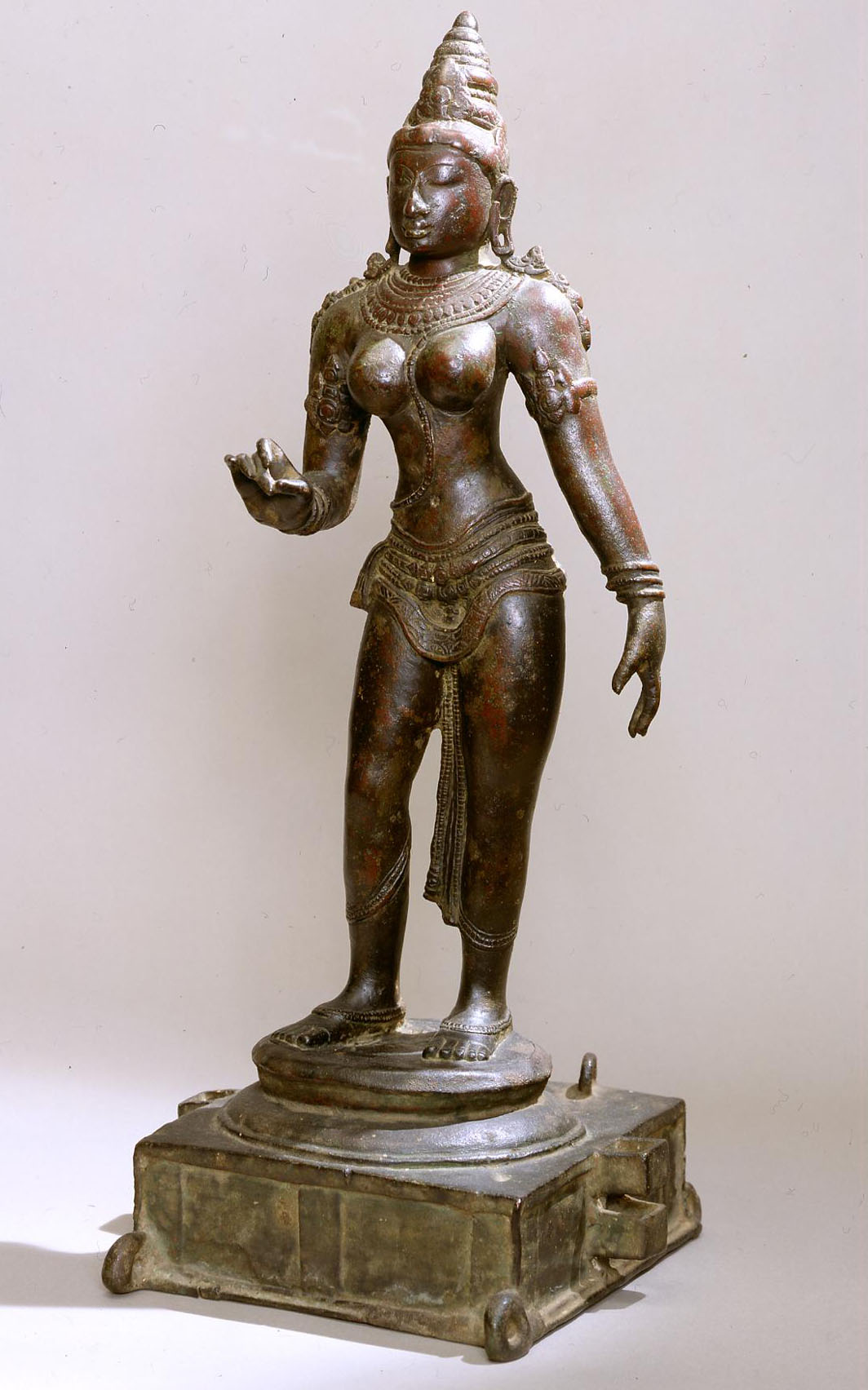 Chola Bronze, Ulster Museum